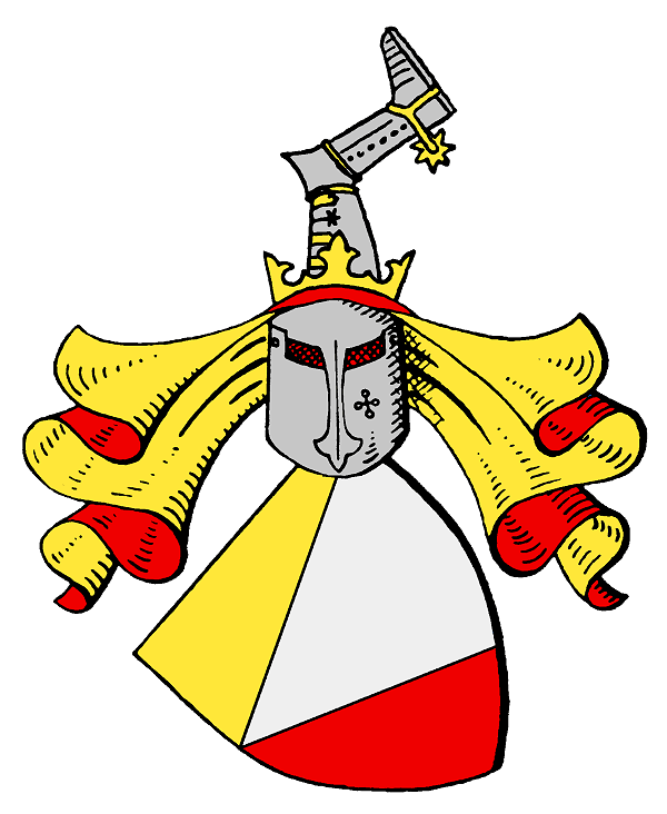 Stammwappen derer von Negendank